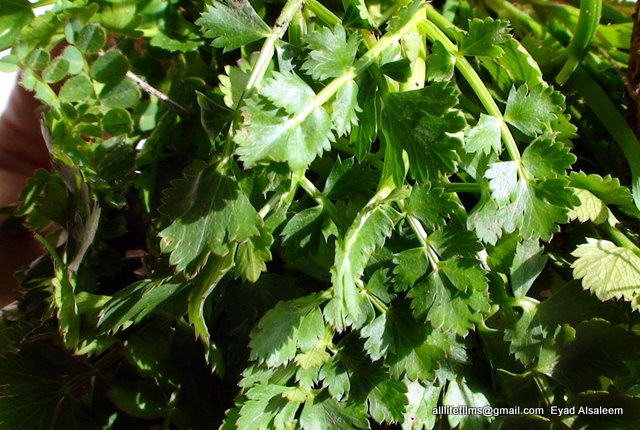 نباتات برّية سورية تؤكل